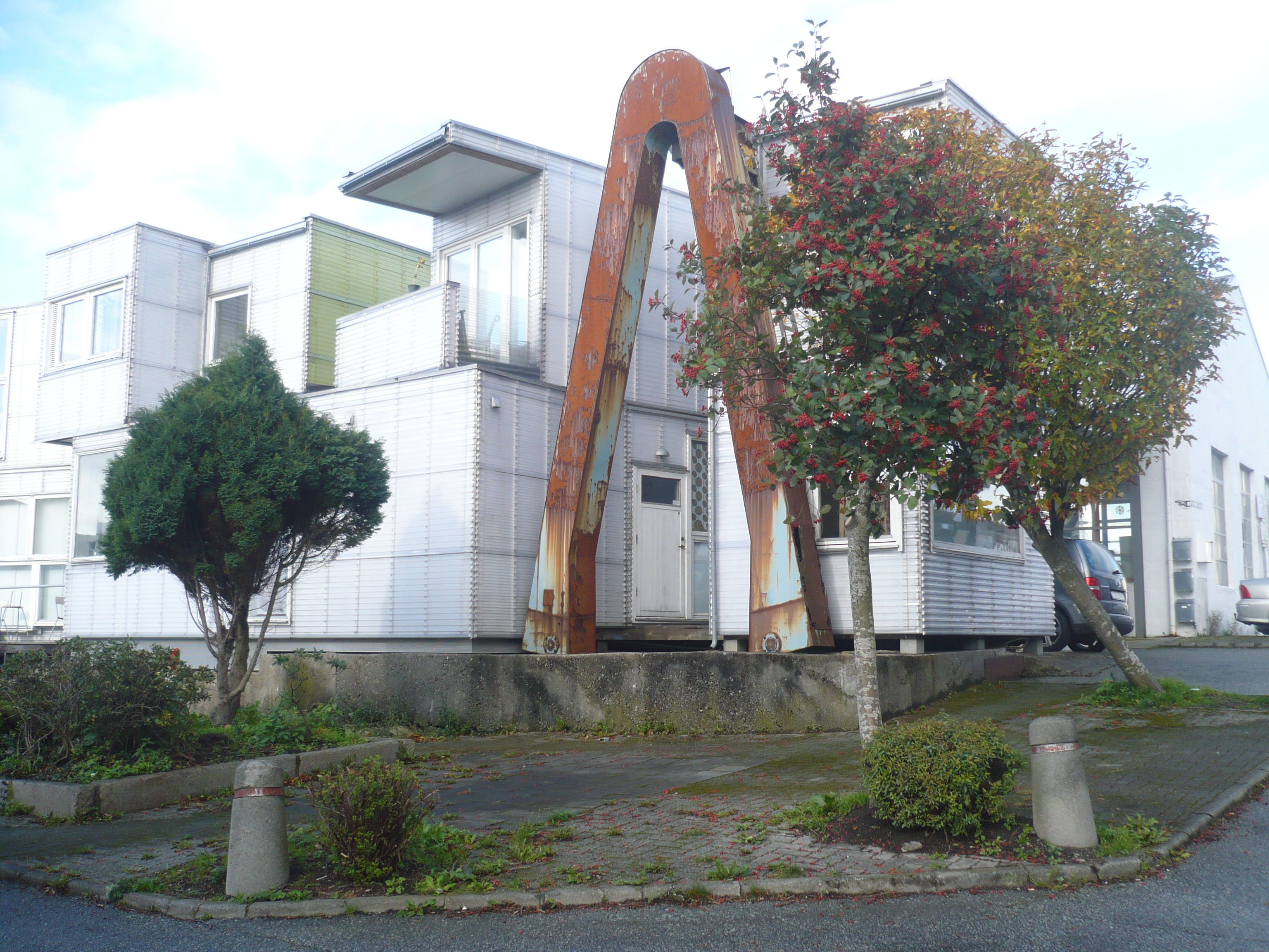 Her sto tidligere vindmølla på Møllehaugen i Pedersgata i Stavanger.